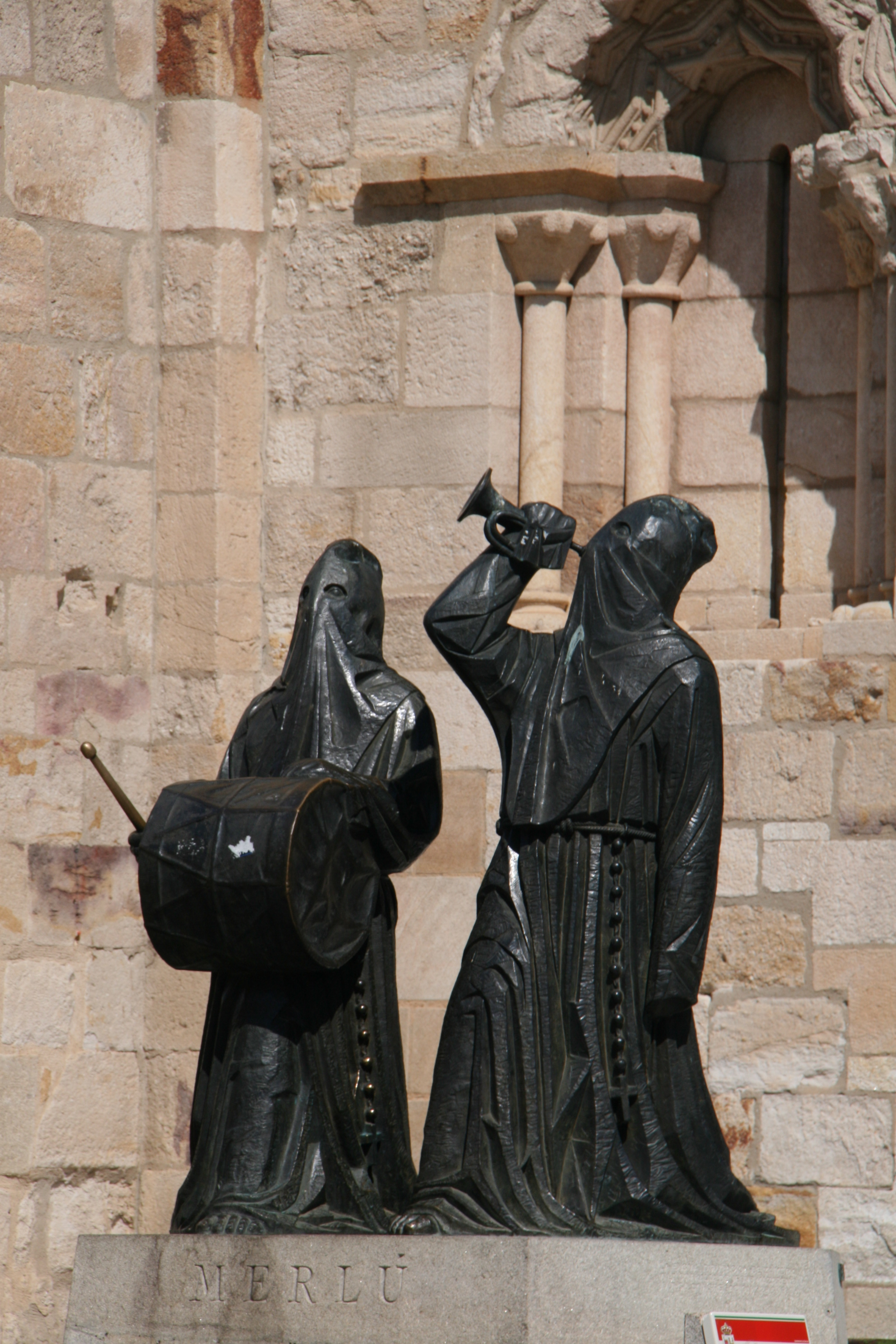 Escultura del Merlú por Antonio Pedrero, Semana Santa de Zamora